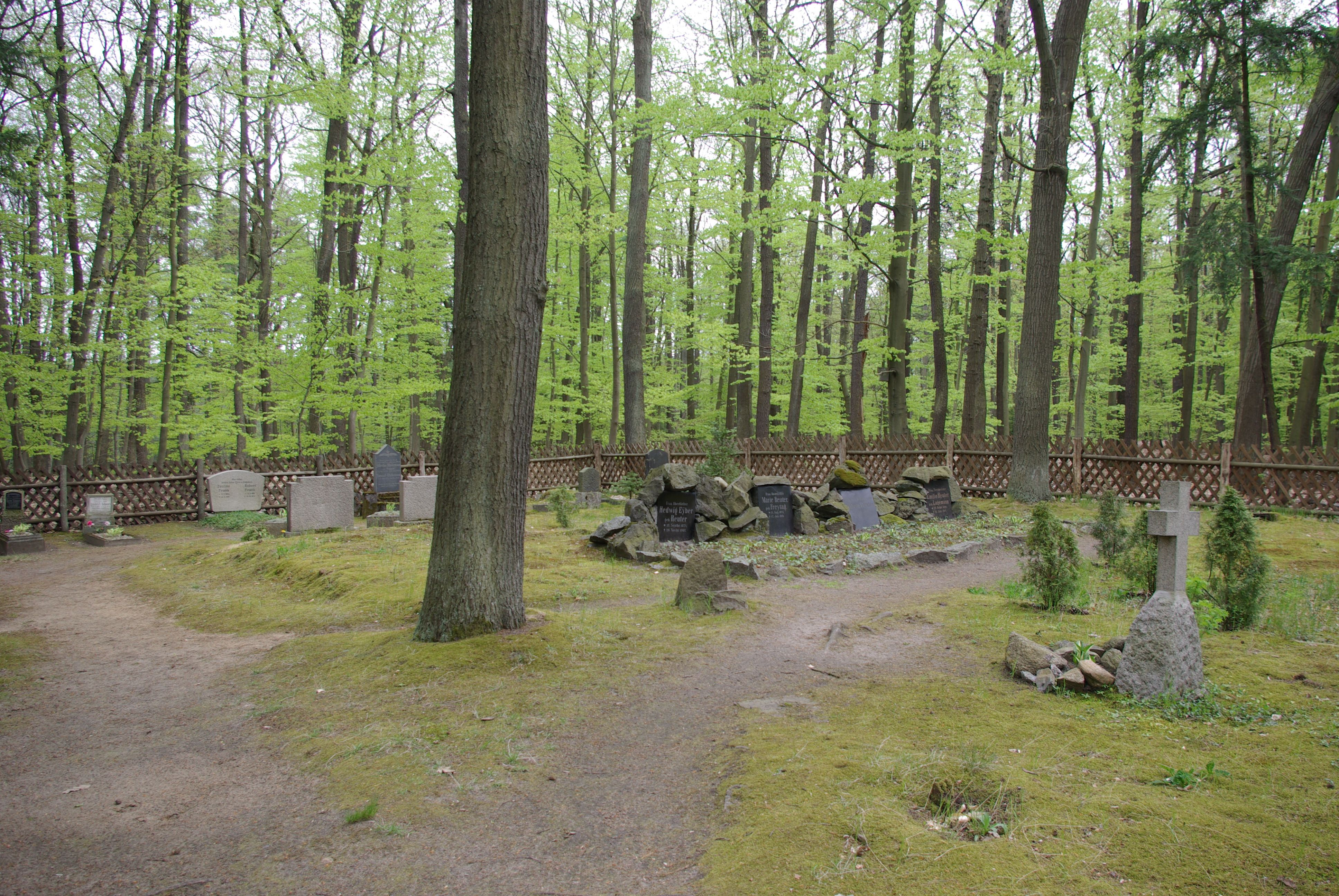 Siehdichum in Brandenburg. Der Försterfriedhof liegt in der Nähe des Forsthauses Siehdichum auf einer Höhe.